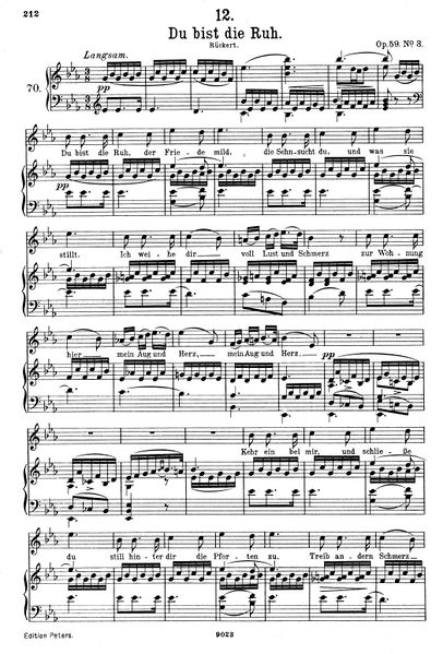 Edition de Friedlaender en 1910 du Lied "Du bist die Ruh" de Schubert